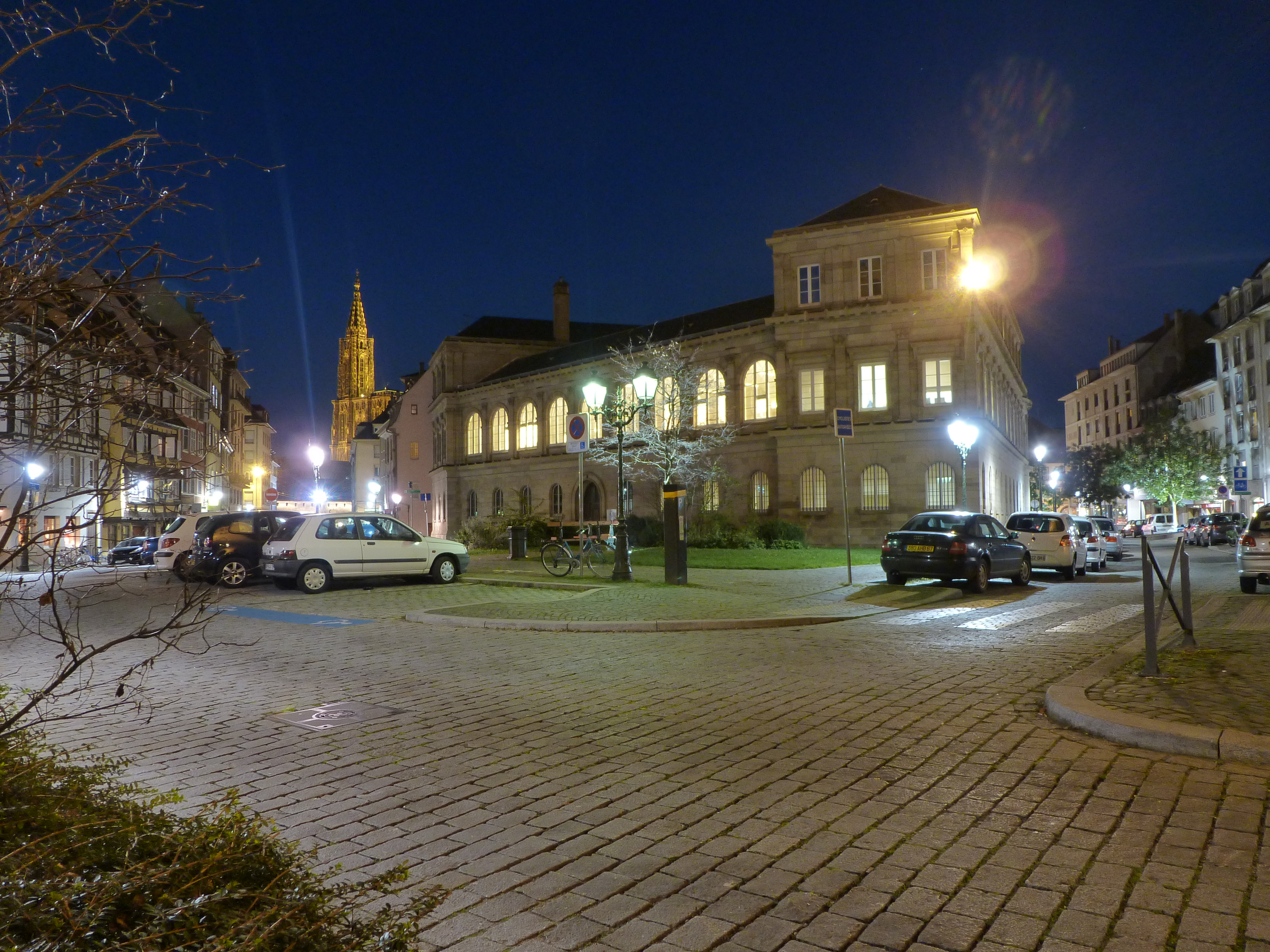 Place de l’hôpital de Strasbourg, de nuit.